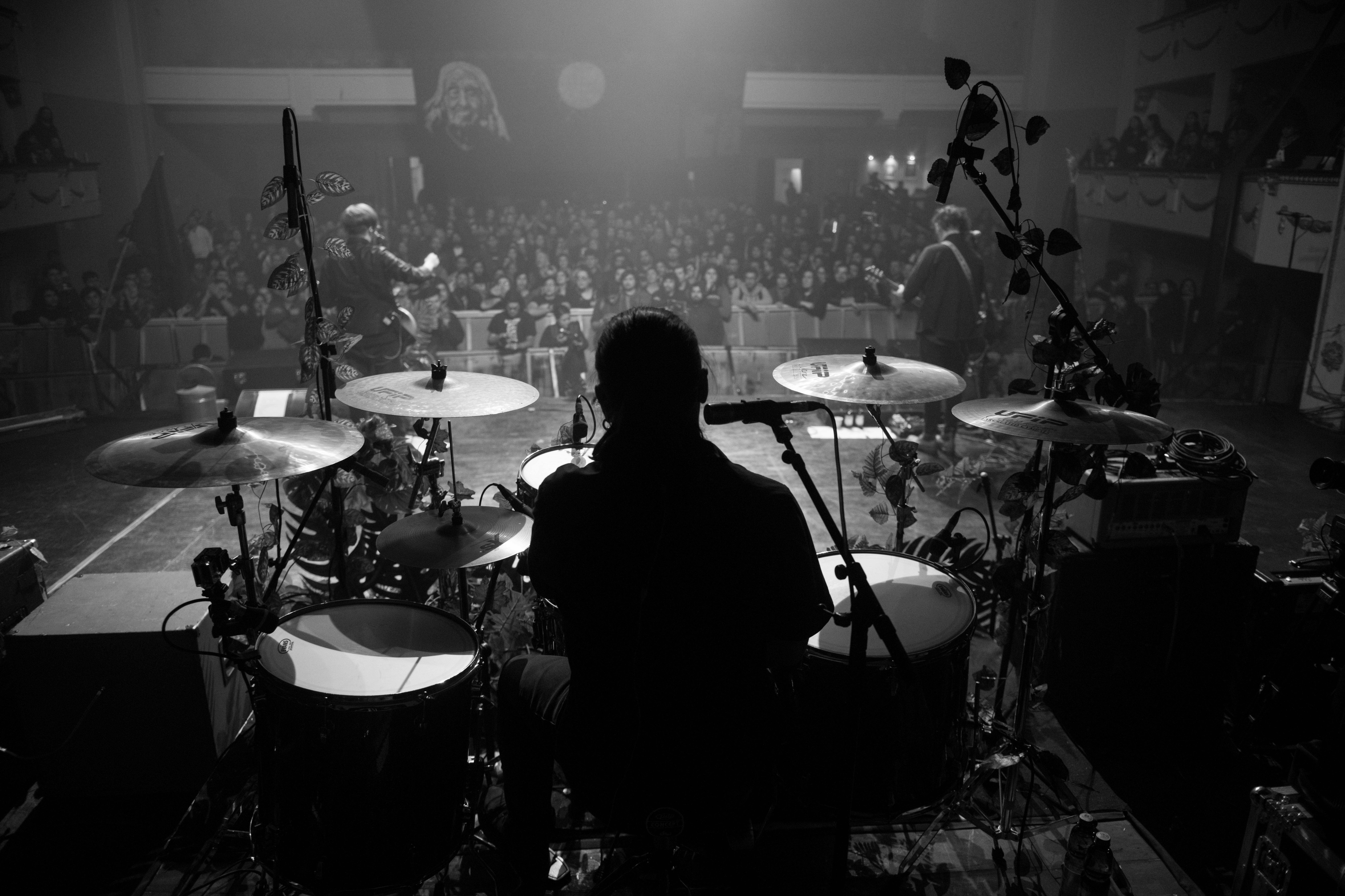 Foto del show de Alectrofobia en Teatro Cariola, vista desde la batería.